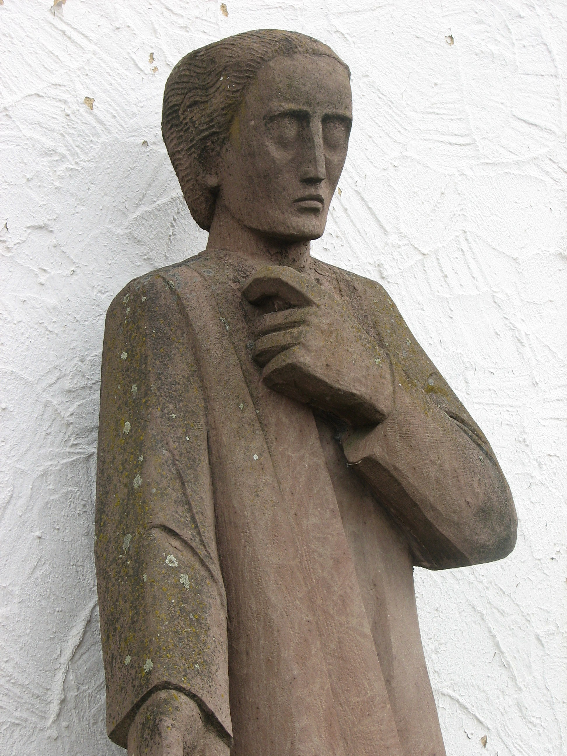 Christusfigur an der Südfront der Evangelisch-methodistischen Kirche (Friedenskirche) in Heidenheim an der Brenz, geschaffen von Helmuth Uhrig 1959 aus rotem Buntsandstein